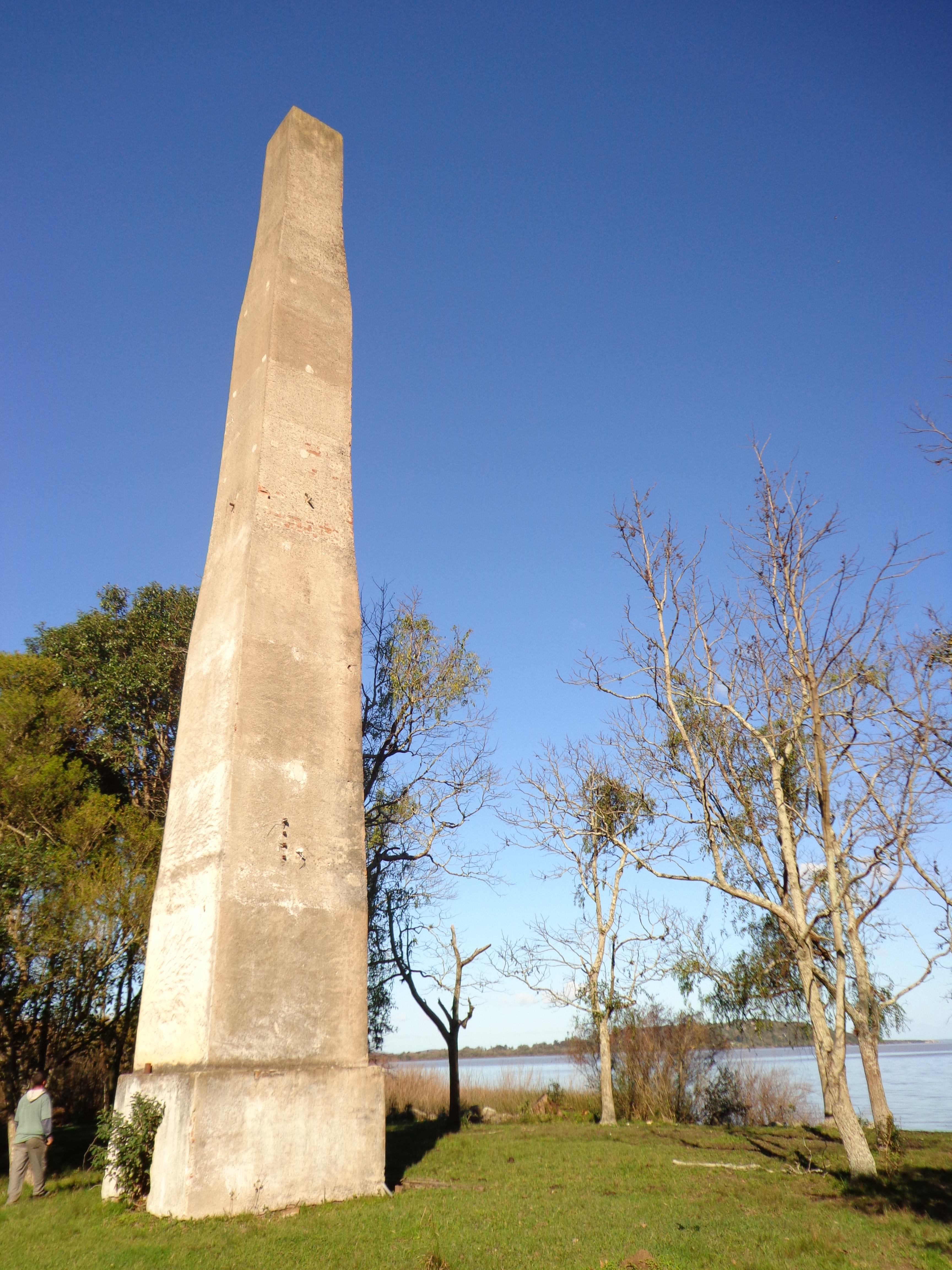 Ruína da chaminé da antiga "Olaria do Peixoto", inaugurada em 1909, no bairro Ponta Grossa, em Porto Alegre, Rio Grande do Sul, Brasil.